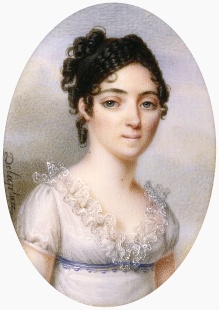 La maréchale Bessières, duchesse d'Istrie, née Marie-Jeanne Lapeyrière (1781–1840)